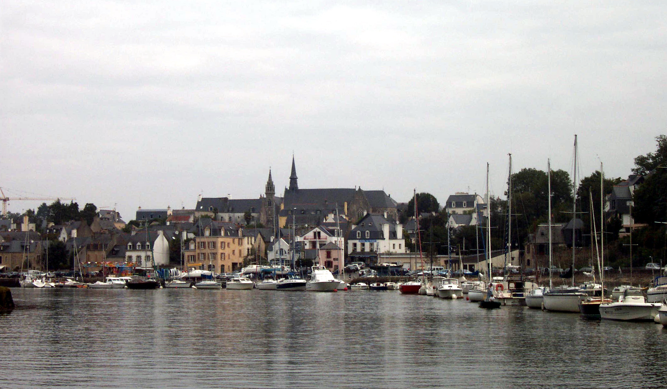 Port d'Auray